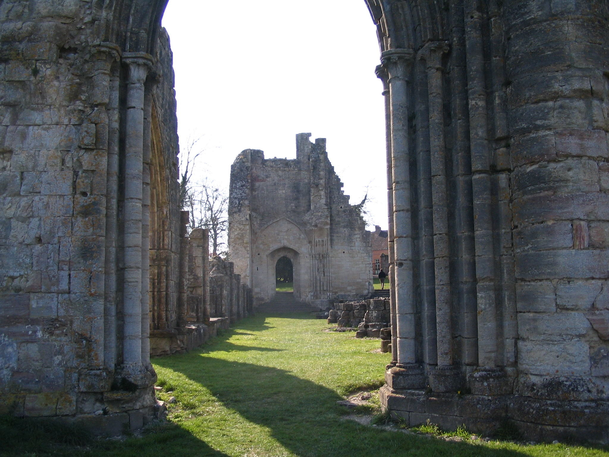 Ruines de l'abbaye Saint-Evroult-Notre-Dame-du-Bois (Orne, France).